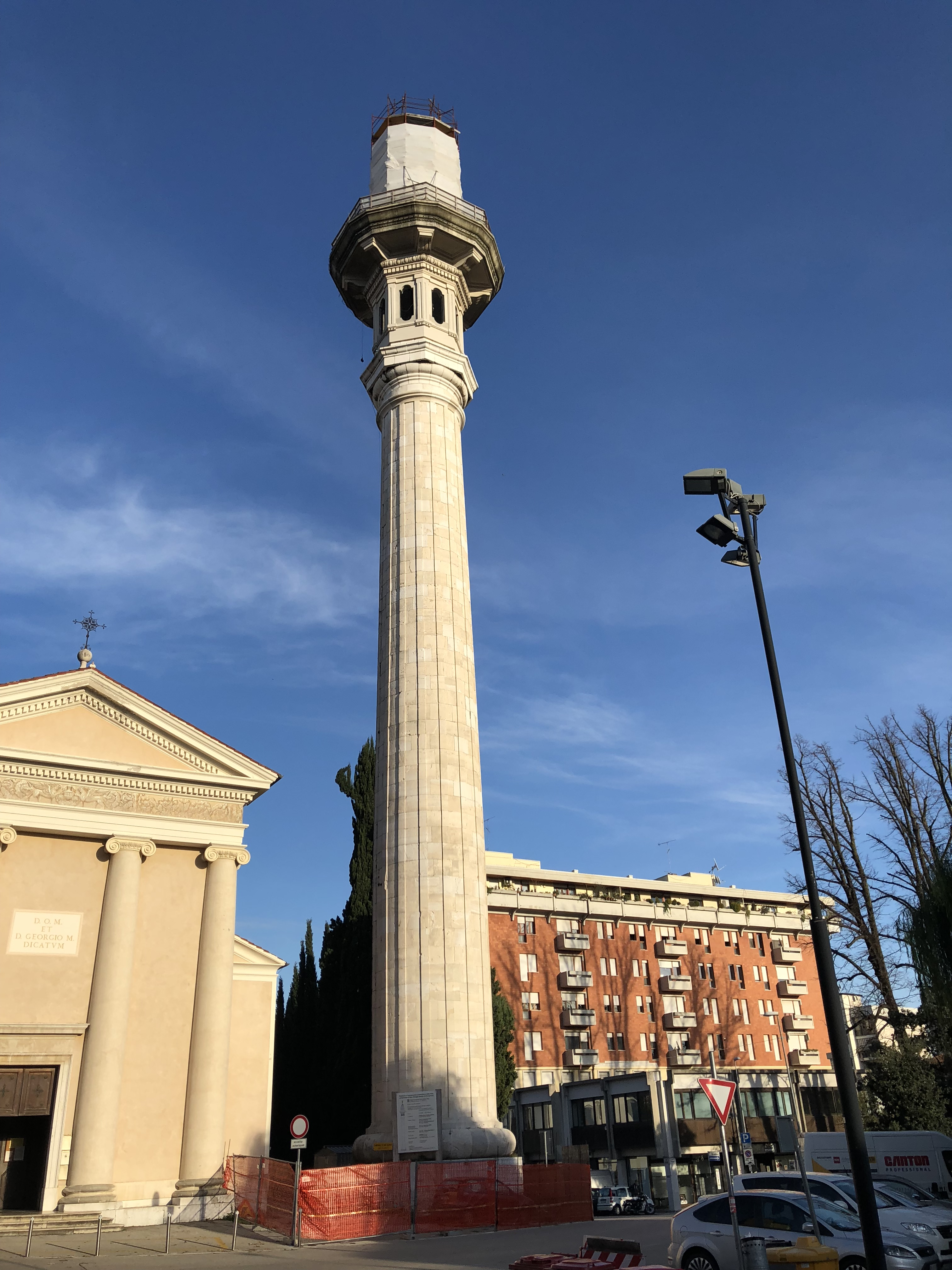 Campanile